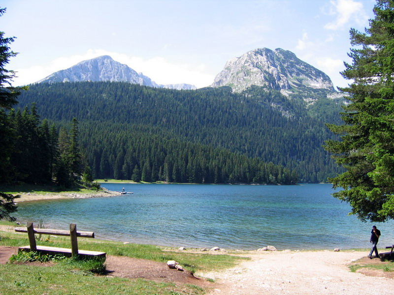 Black Lake, Montenegro